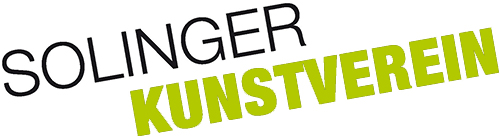 Schriftlogo des Solinger Kunstvereins